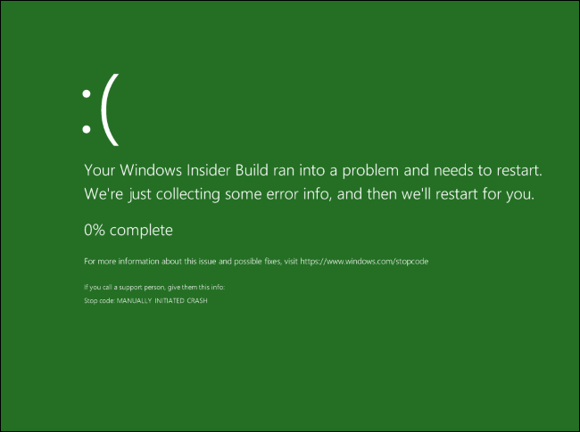 Зелёный экран смерти